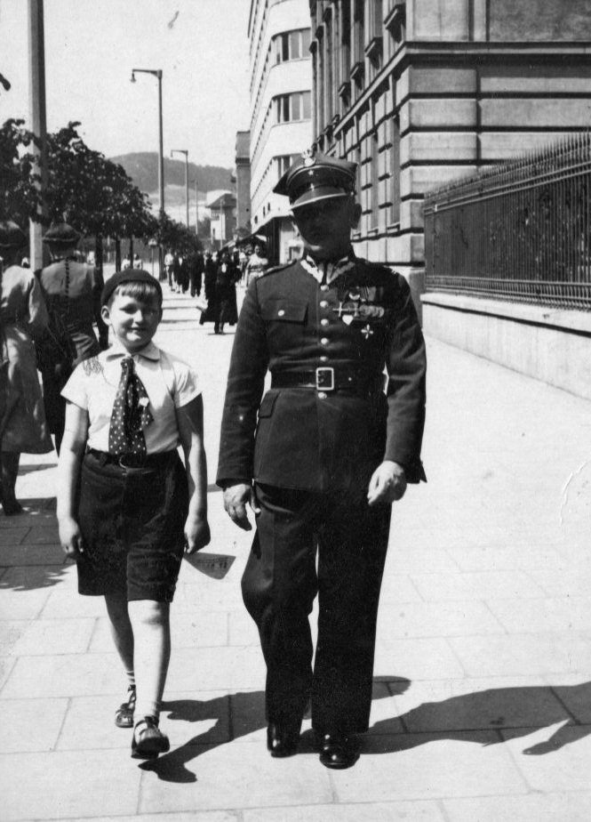 Stanisław i Janusz Zaucha w Gdyni na ul 10 lutego w 1938r